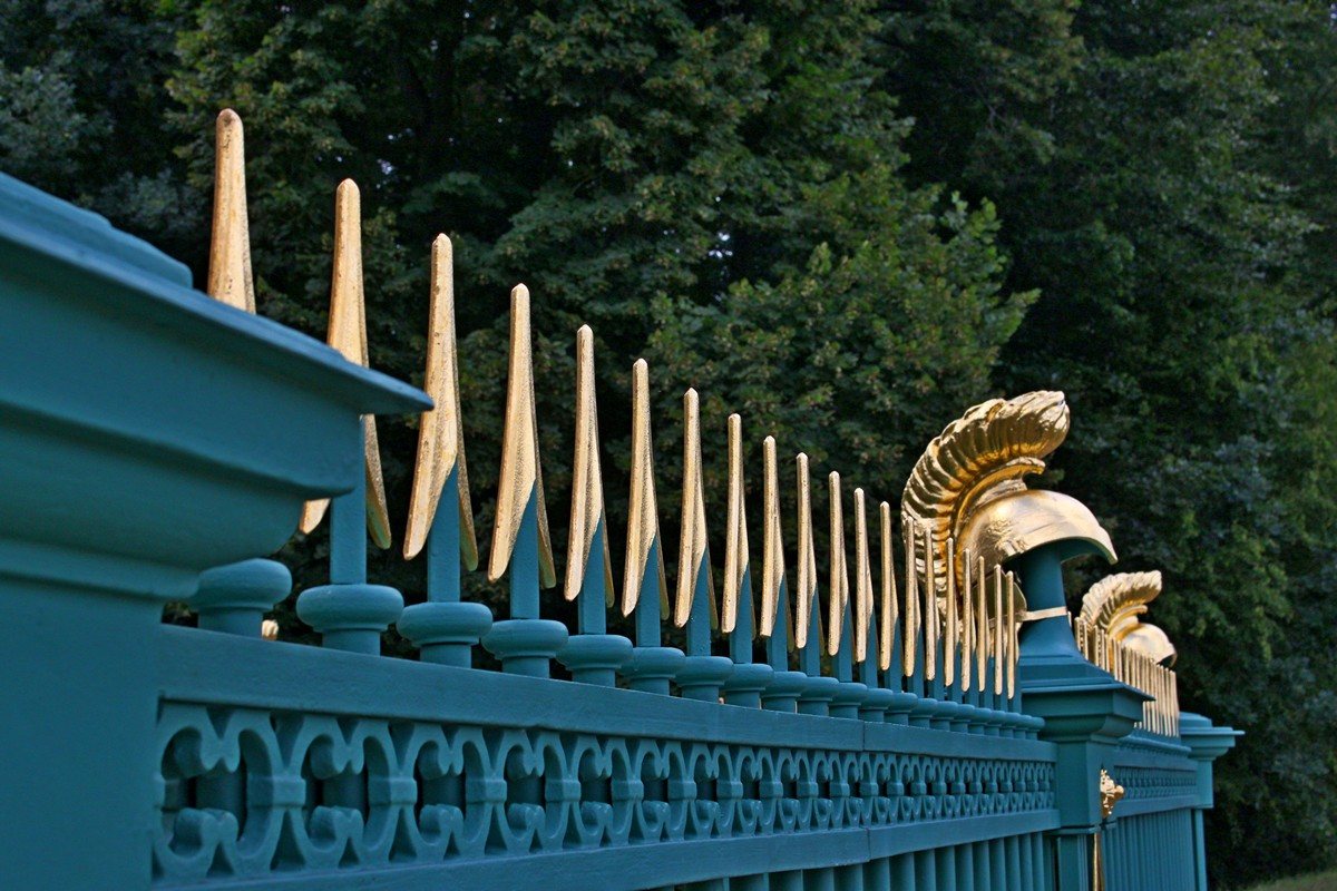 Einfriedung des Helden-Obelisken in Rheinsberg.